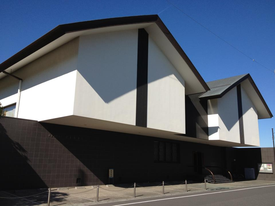 今里隆の建築